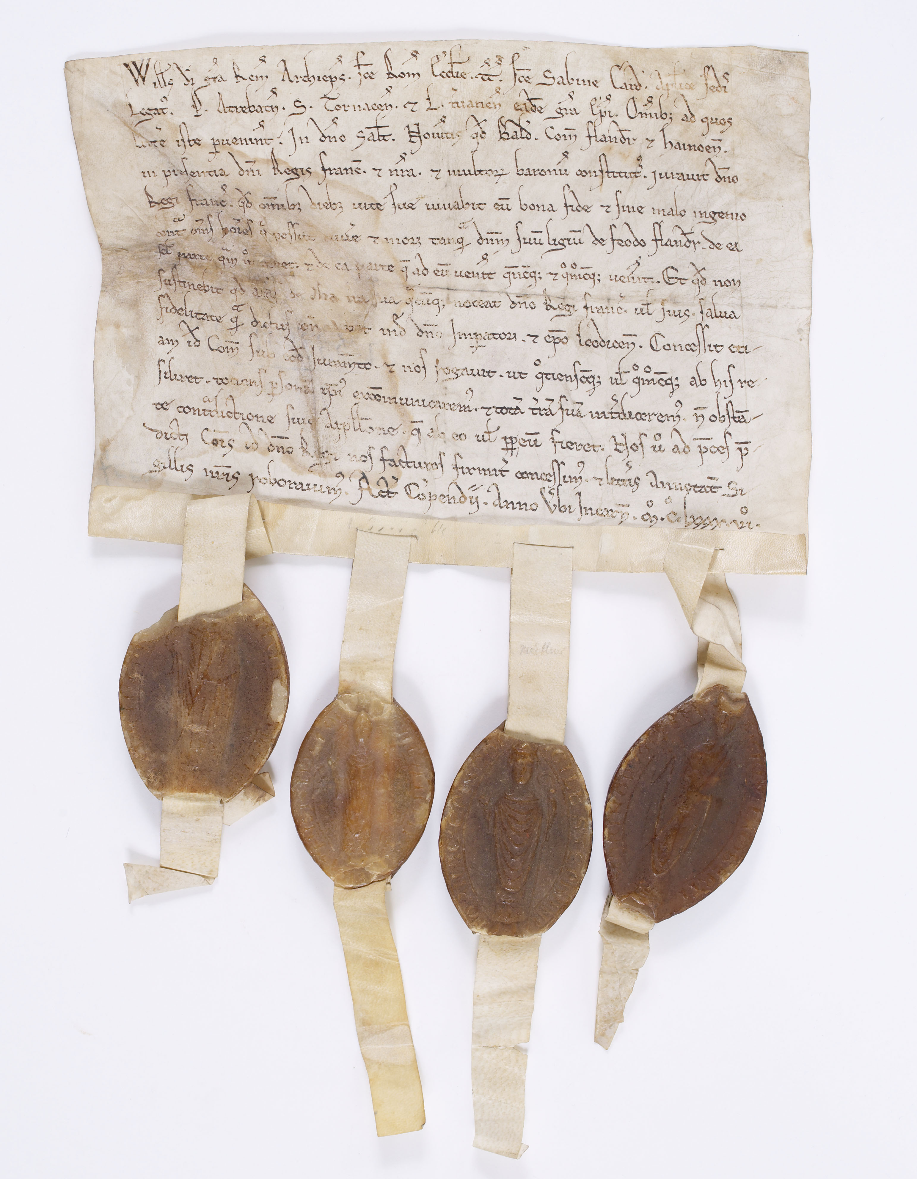 Hommage du comte de Flandre au roi de France Philippe Auguste, devant l'archevêque de Reims Guillaume aux Blanches Mains et trois autres prélats. Acte en latin sur parchemin scellé de quatre sceaux de cire jaune en navette (archiépiscopaux) pendant sur double queue de parchemin, fait à Compiègne en 1196